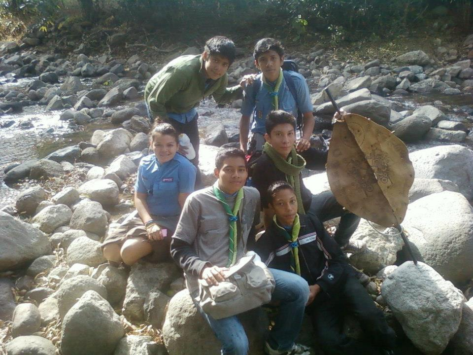 Participación de Grupo 12 Panteón Maya en Jamboree 2013